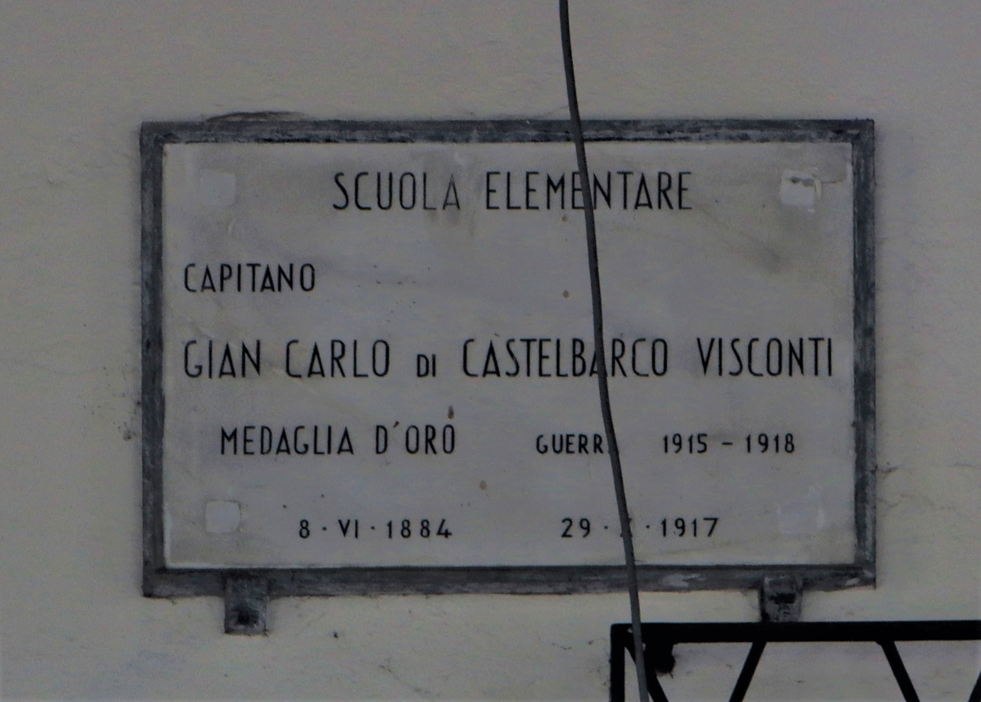 Ex scuola elementare poi asilo. Targa in memoria di Gian Carlo di Castelbarco Visconti